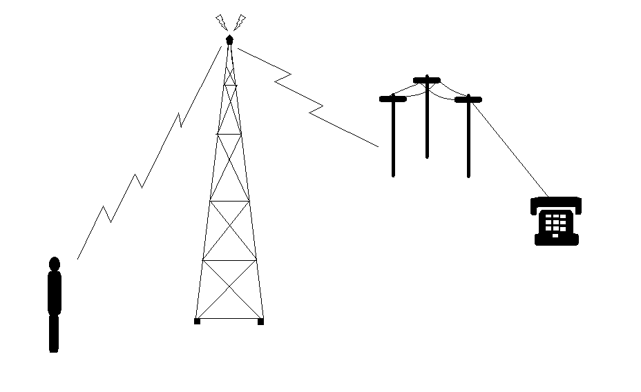 Telefooninterconnecties